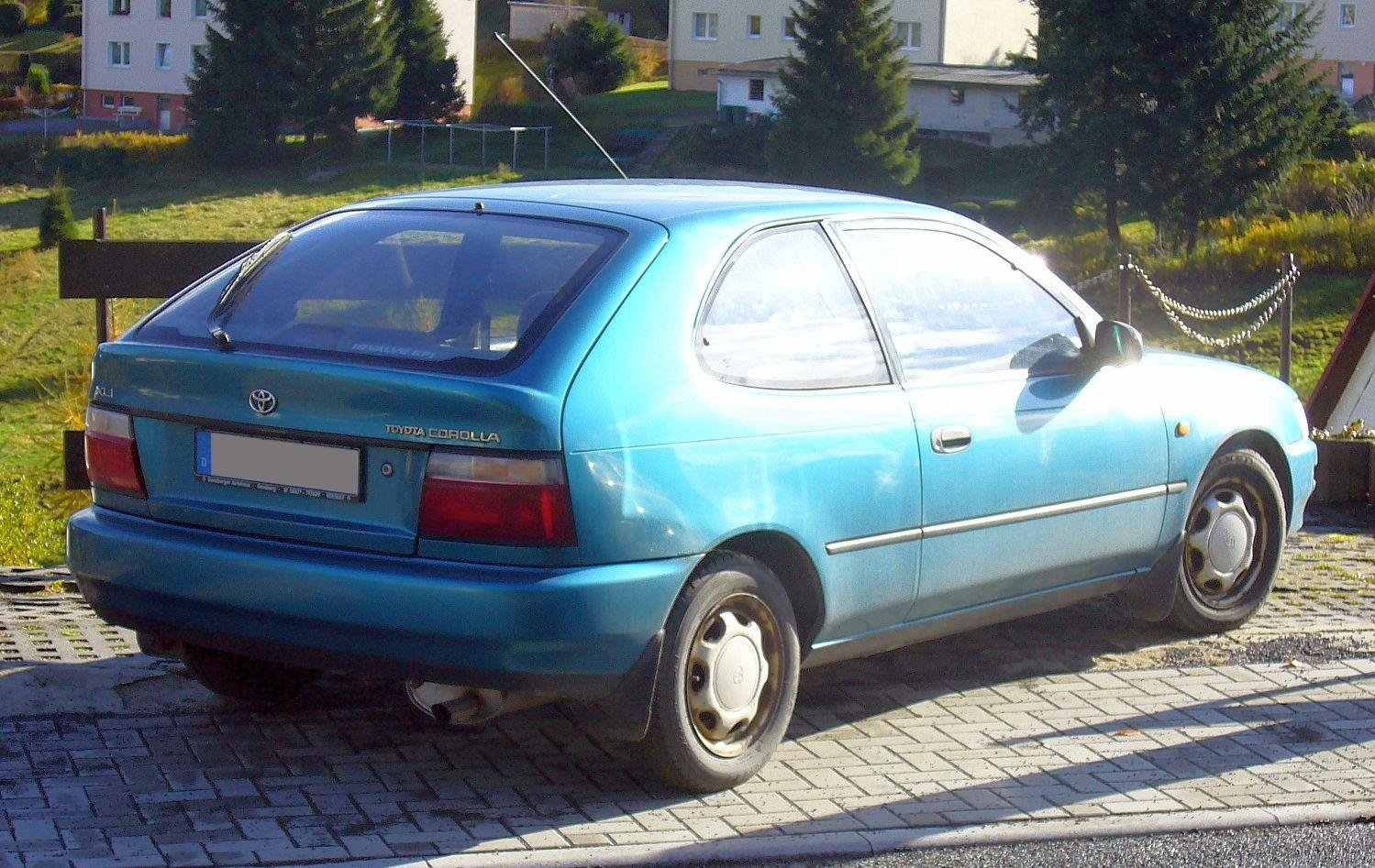 Toyota Corolla E100